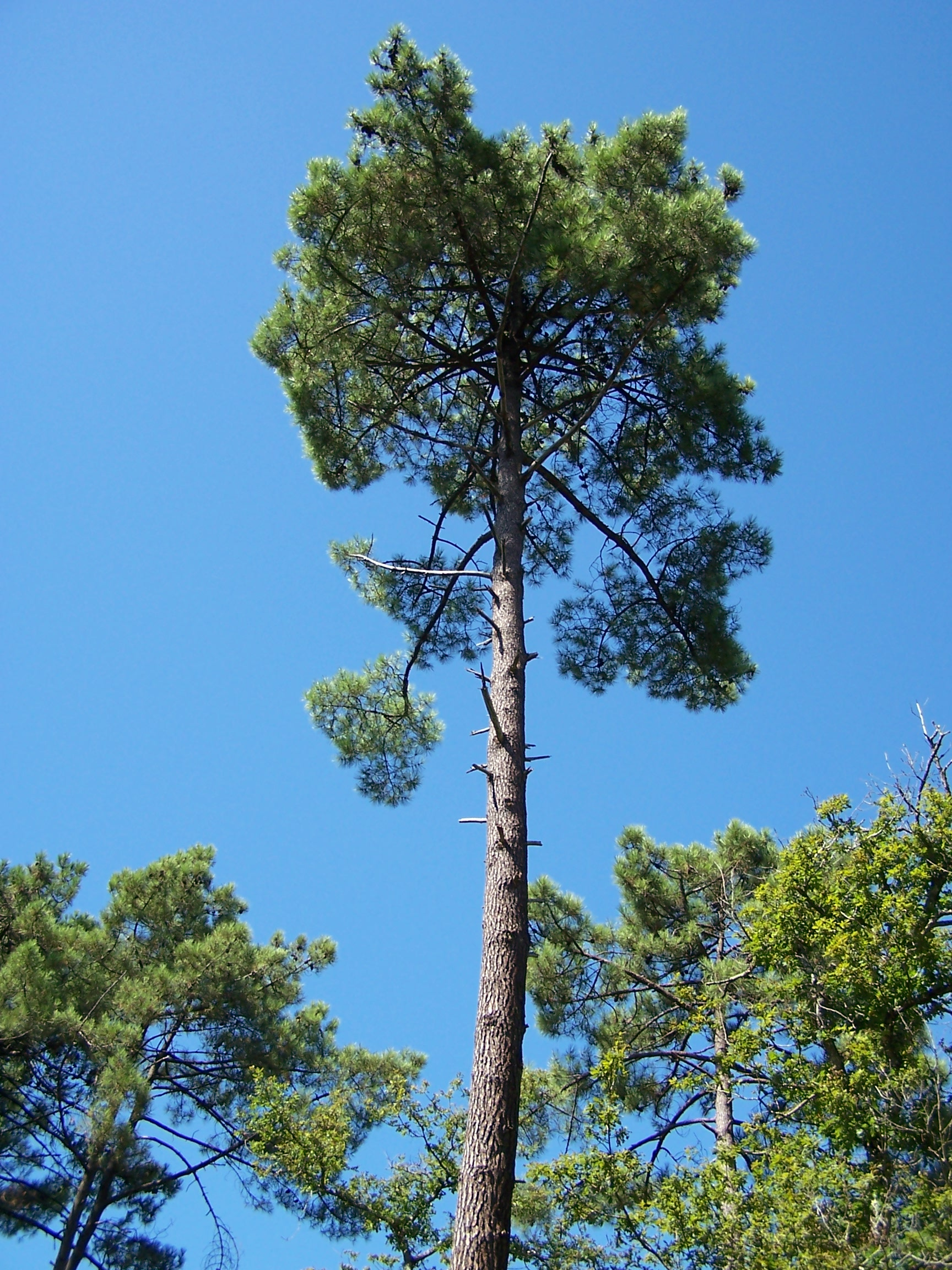 Photographie prise dans la forêt de la Coubre, une forêt domaniale couvrant plus de 4 277 hectares en bordure du littoral de la presqu'île d'Arvert, en Charente-Maritime, sur les communes des Mathes et de La Tremblade. C'est une forêt de pins maritimes, de chênes verts, de chênes pédonculé et d'arbousiers qui a été plantée au début du XIXe siècle pour contenir l'avancée des sables et protéger le site des érosions éolienne et marine très actives. Classée forêt littorale de protection, elle abrite une faune variée comportant notamment des cerfs élaphes, des chevreuils et des sangliers.